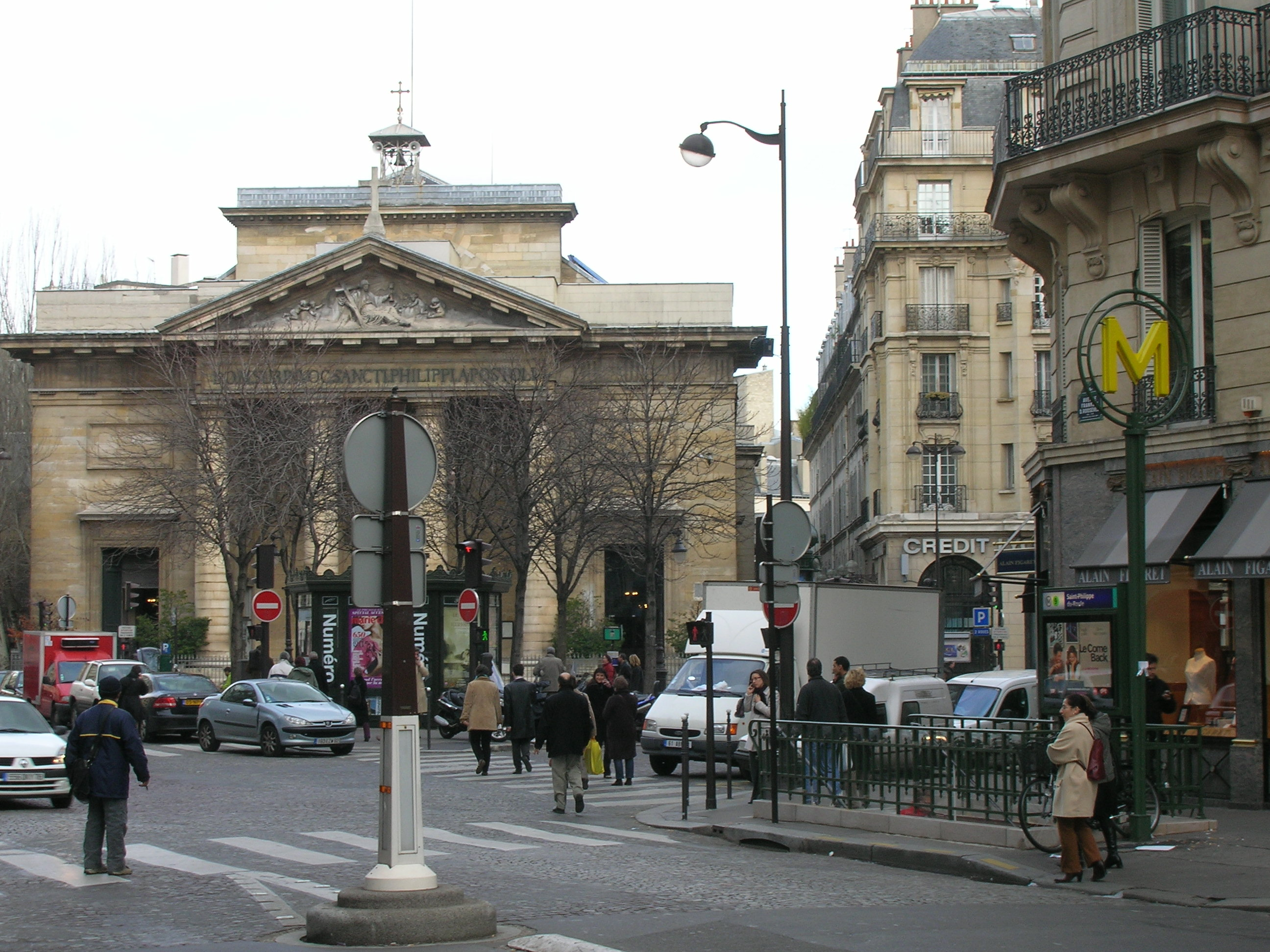 Station Saint Philippe du Roule au niveau de la rue (Avenue Franklin D. Roosevelt/rue du Faubourg St Honoré)